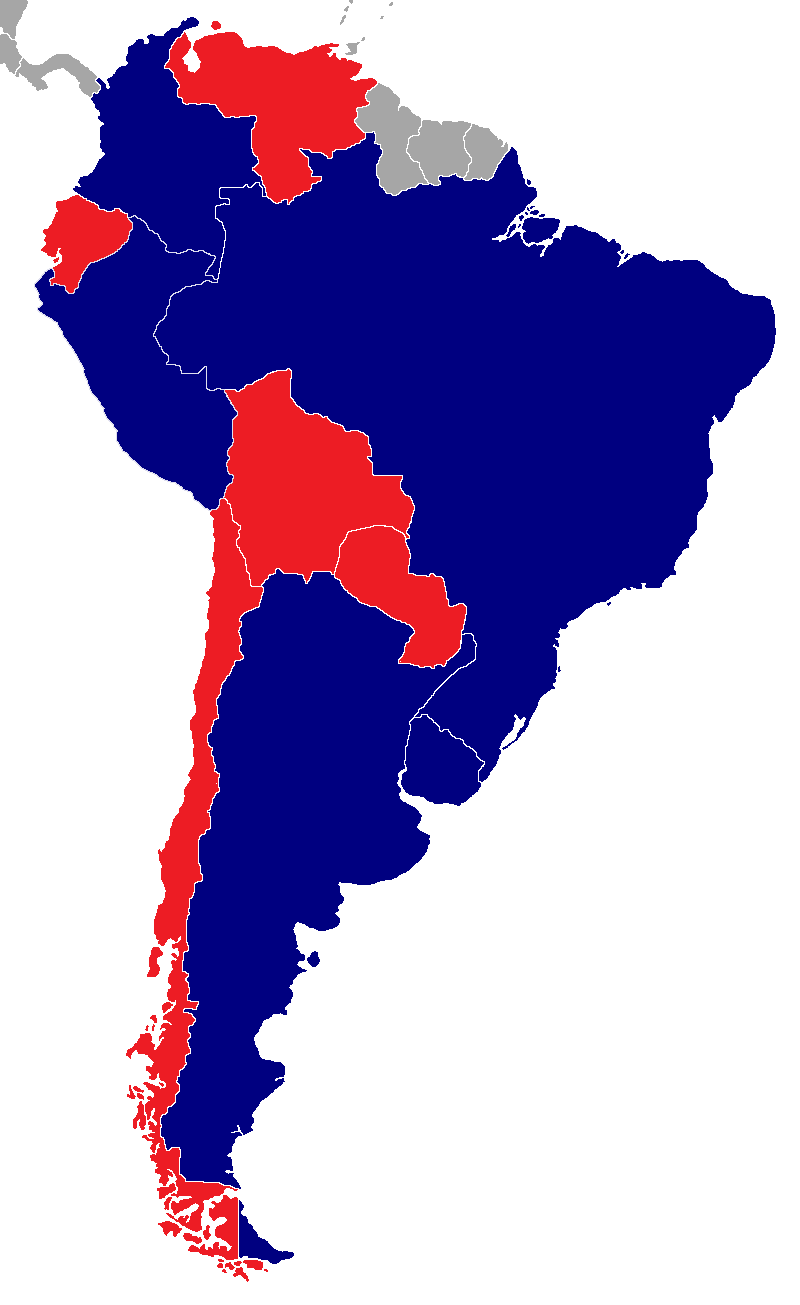 Selecciones clasificadas de Conmebol